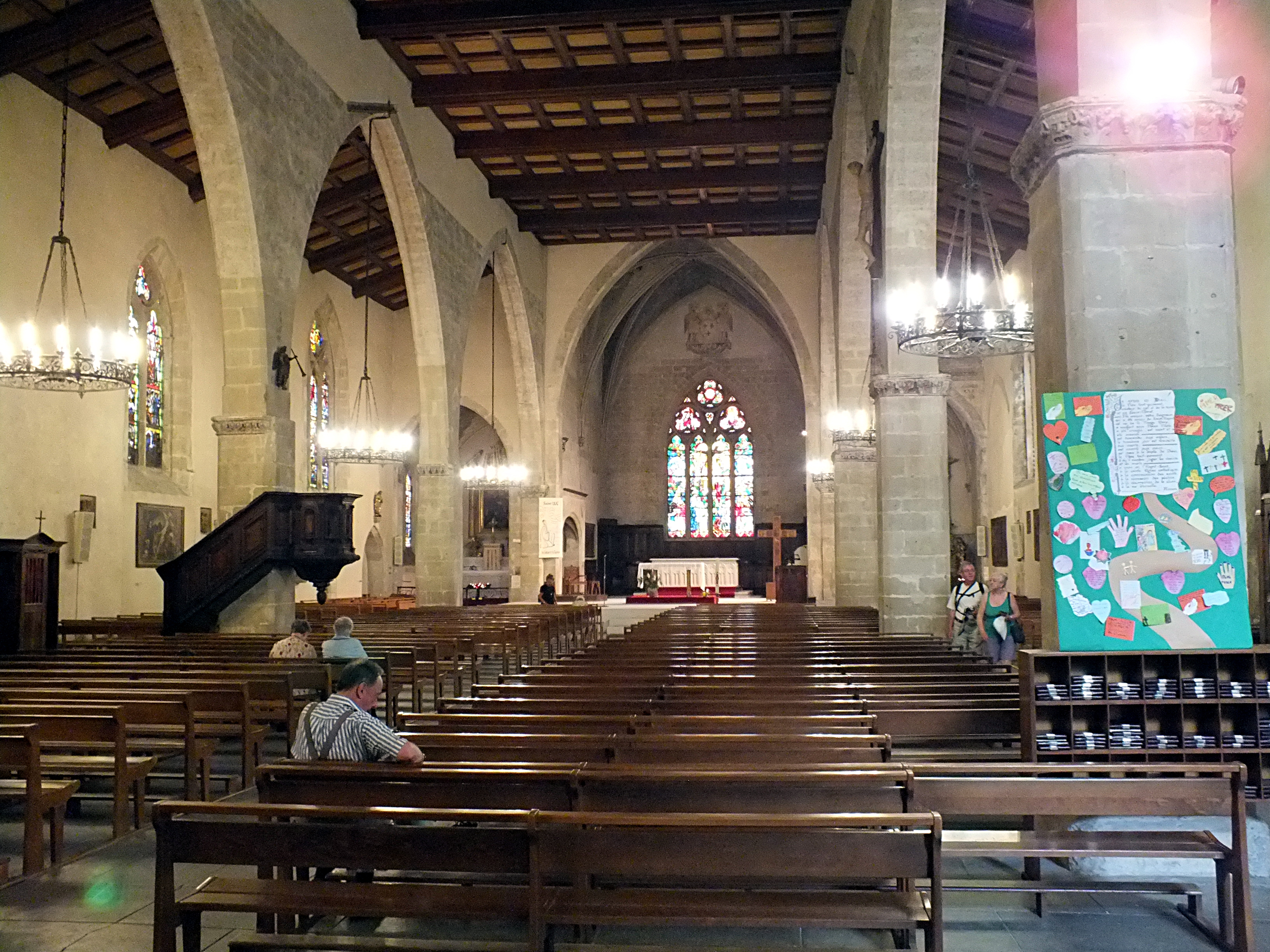 Tournon-sur-Rhône, Kirche St Julien (Heiliger Julianus)